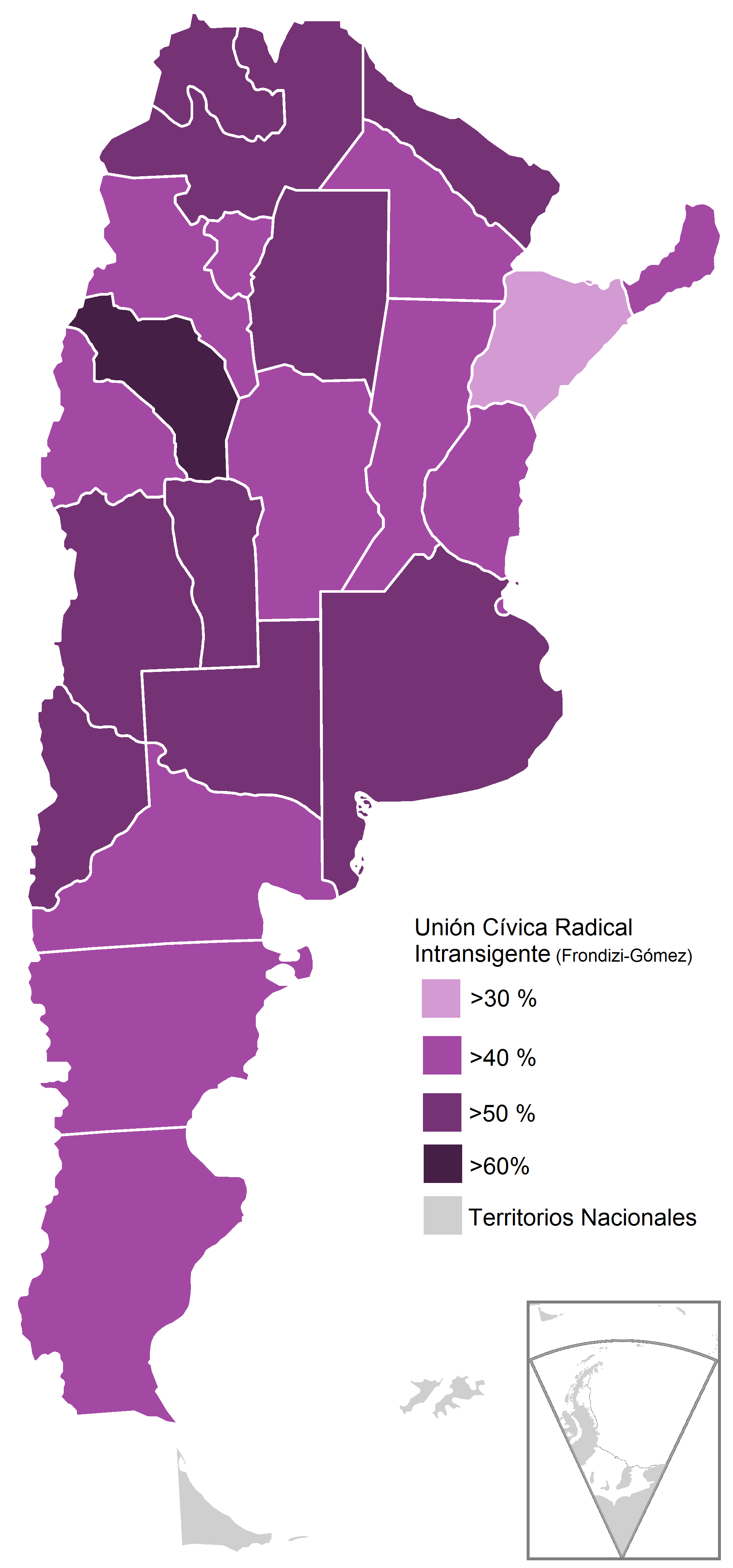 Mapa de las elecciones presidenciales de Argentina de 1958. Frondizi triunfó en todas las provincias.